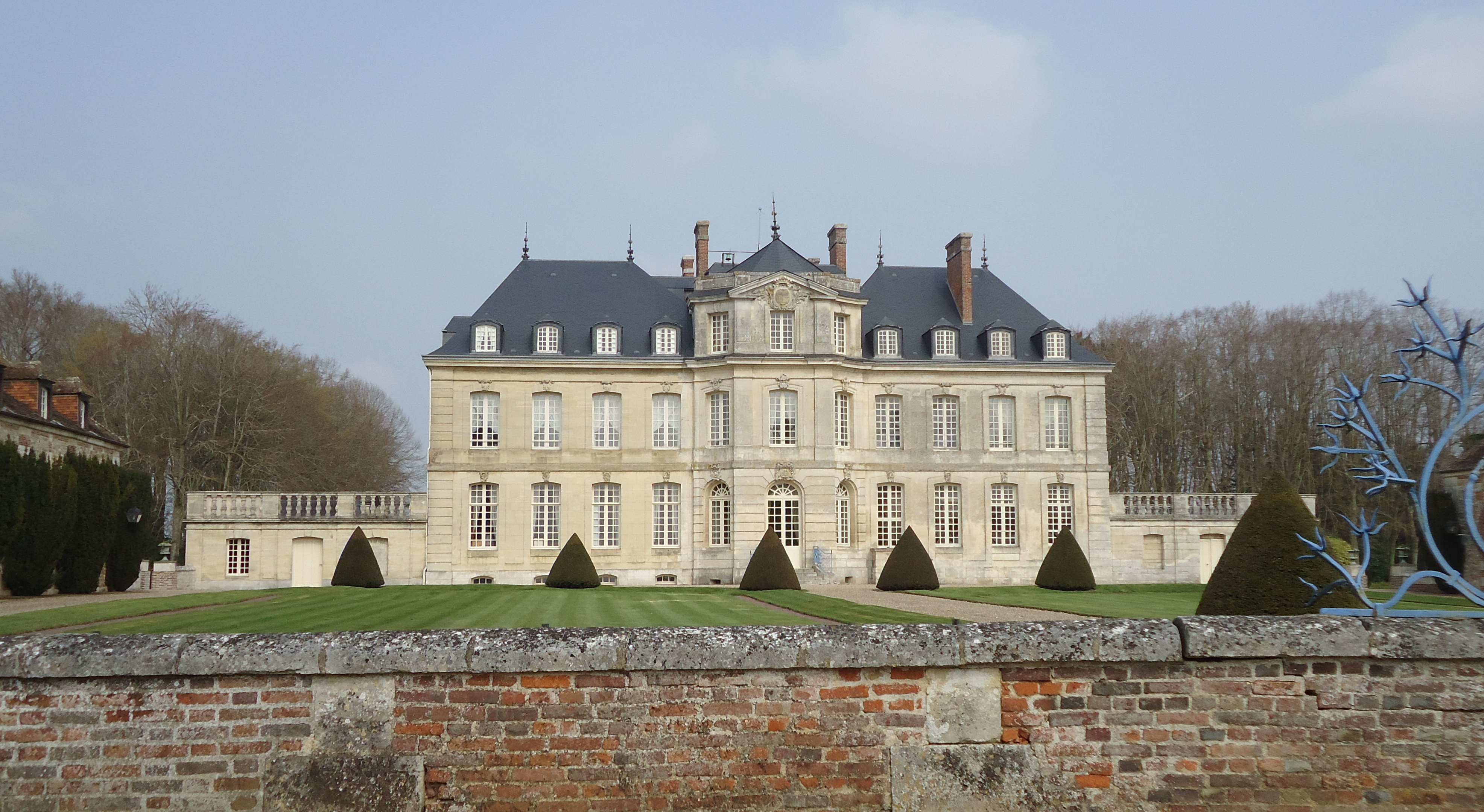 Le Tremblay-Omonville - Château d'Omonville, XVIIIe (MH)